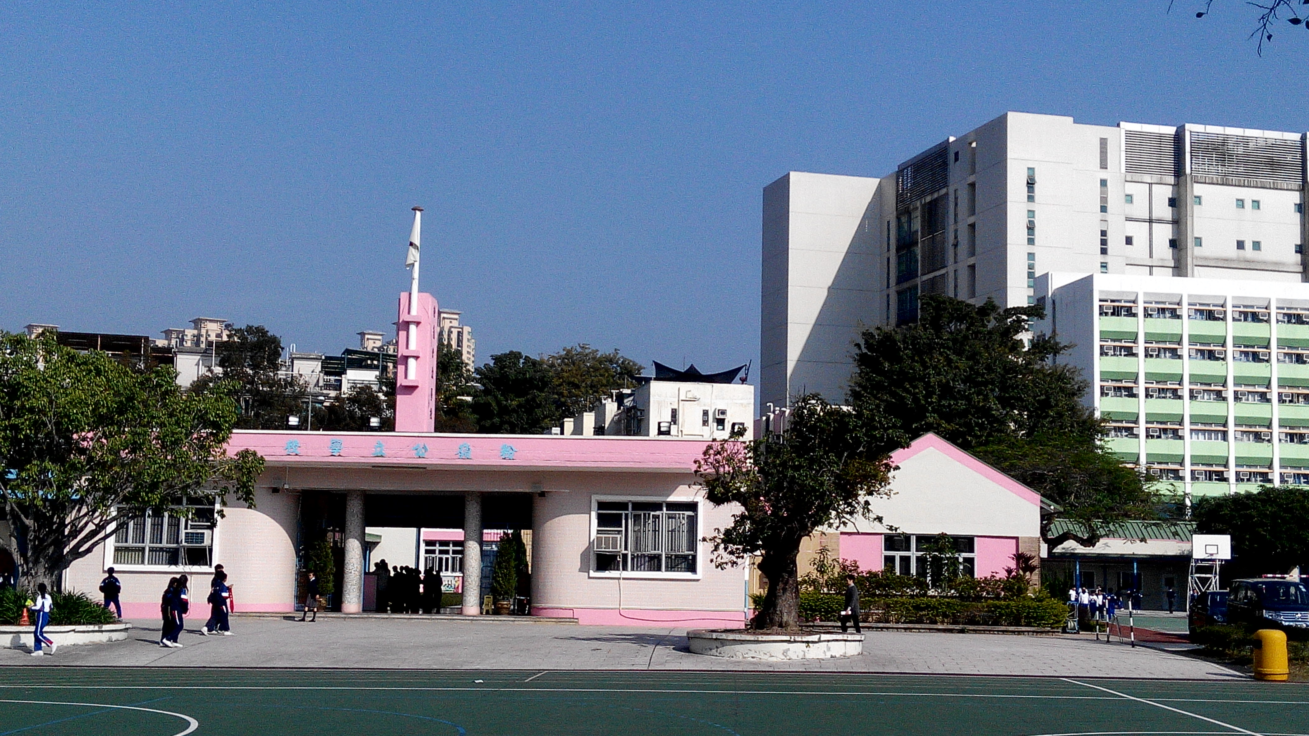 粉嶺公立學校